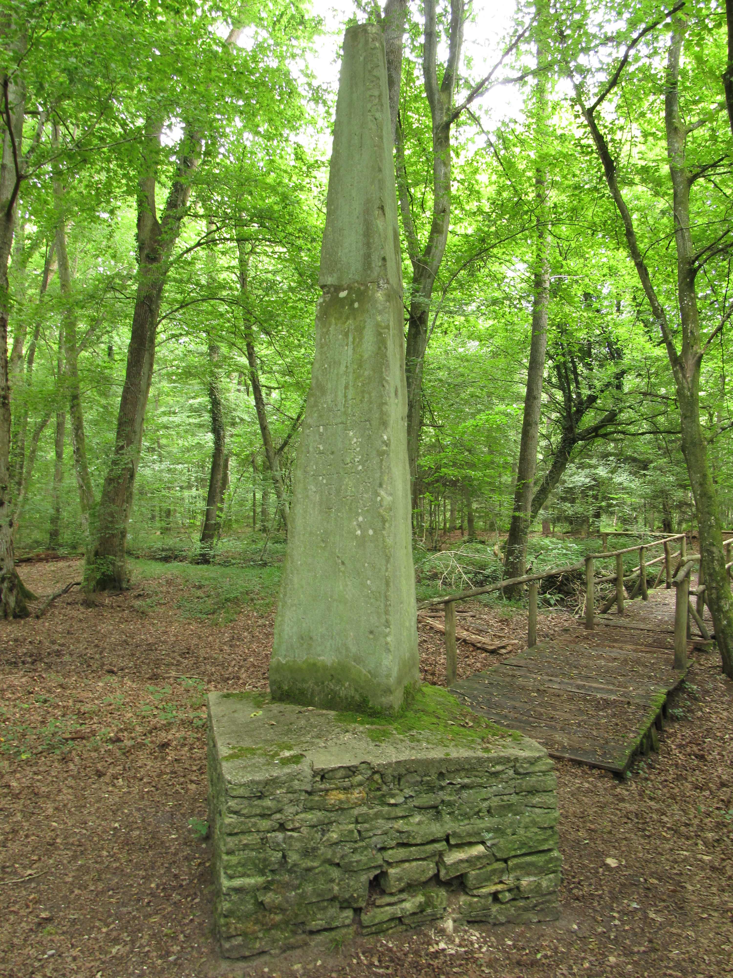 Kulturdenkmal in Wörth am Rhein: OT Büchelberg im Wald nordwestlich des Ortes, westlich von Heil- und Gutenbrunnen: Denkmal; Obelisk in wohl jüngerem Bruchsteinsockel, bezeichnet unter anderem 1940